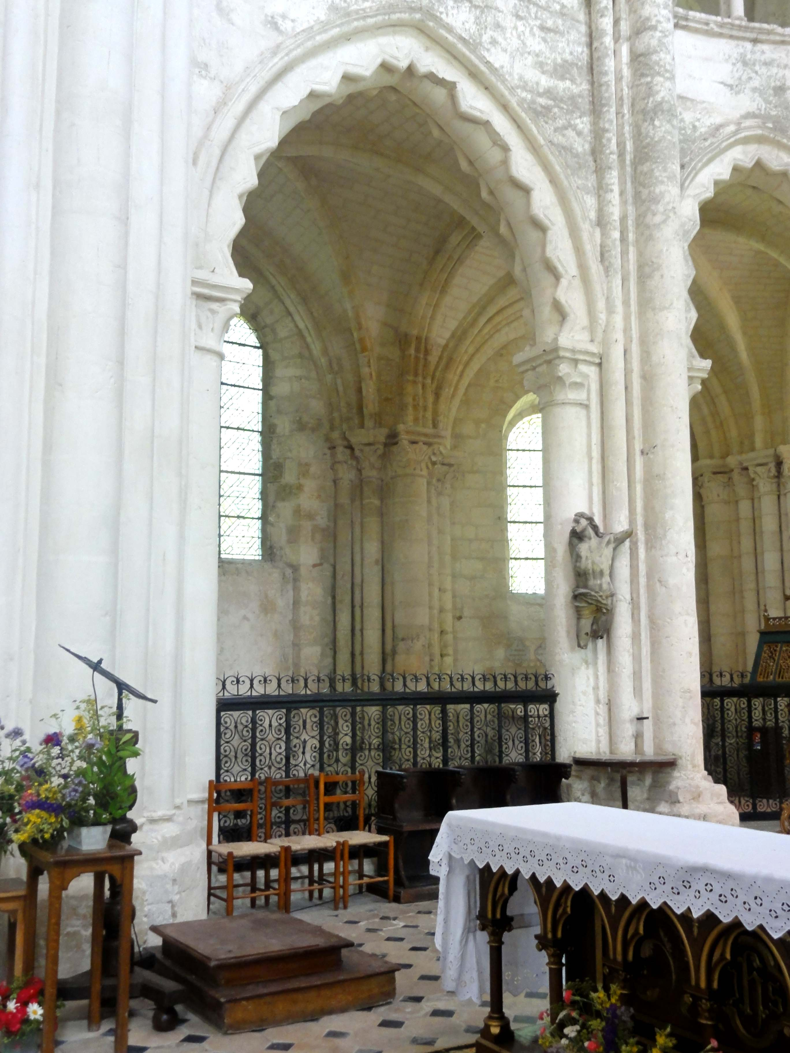 Chœur de l'abbatiale - voir le titre du fichier.